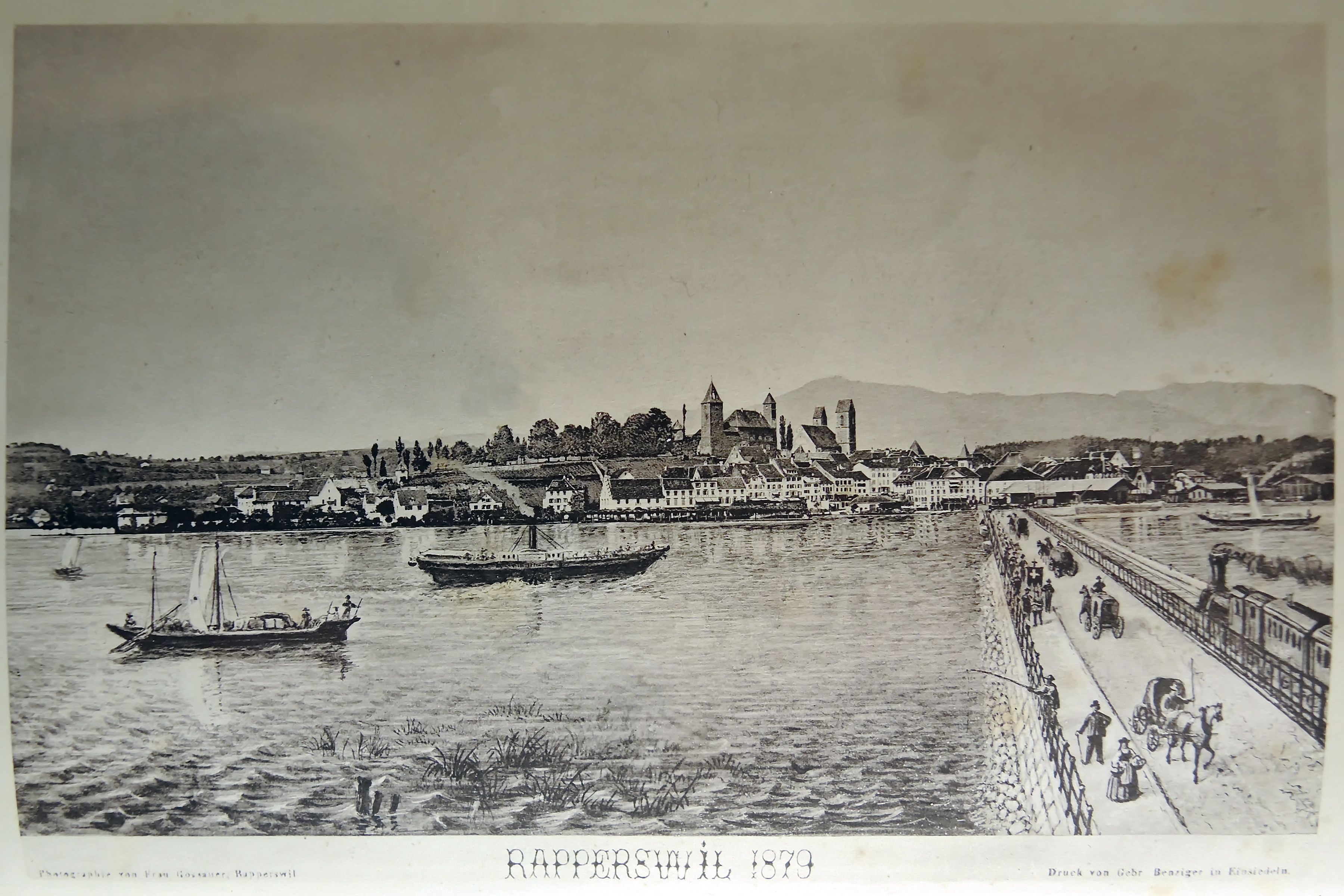 Südansicht von Rapperswil im Jahr 1879 nach dem Abbruch der historischen Seebrücke und während des Baus des Seedamms, im Hintergrund der Lindenhof. Fotografie von Frau Alwina Gossauer, Rapperswil, Druck von Gebr. Benziger, Einsiedeln, als frühes Beispiel einer im Druck erschienen Fotografie ... ergänzt mit zeichnerischen Elementen: Schiffe, Wellen und Gras im Vordergrund, Seedamm mit Dampfeisenbahn, Kutschen und Fussgänger. Das Bild wurde [für Xaver Rickenmanns Buch "Geschichte der Stadt Rapperswil"] vordatiert, weil 1878 der Damm noch im Bau war.